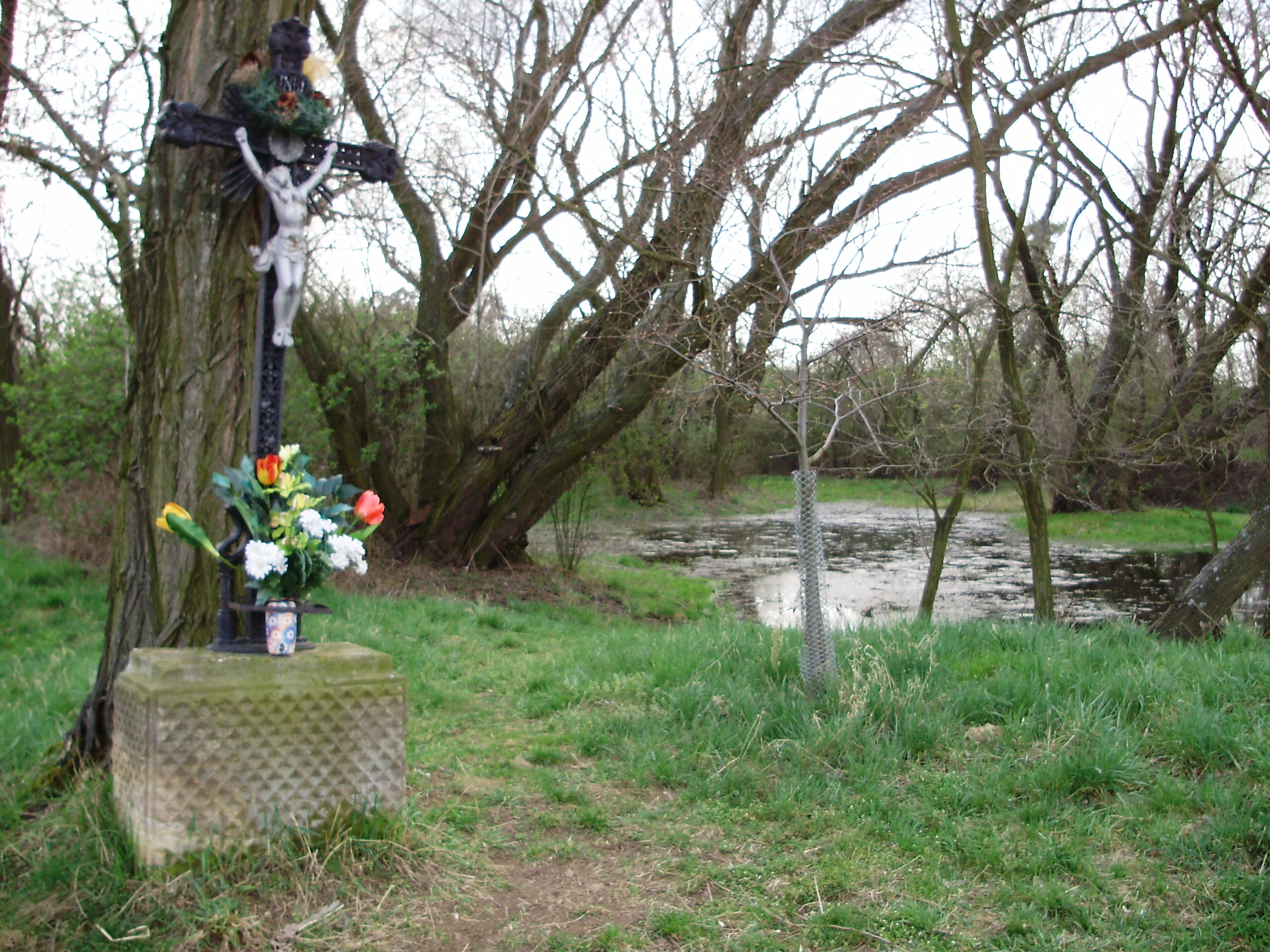 Drnovický mokřad „Žumpy“- Drnovice (Vyškov District, Czech Republic)